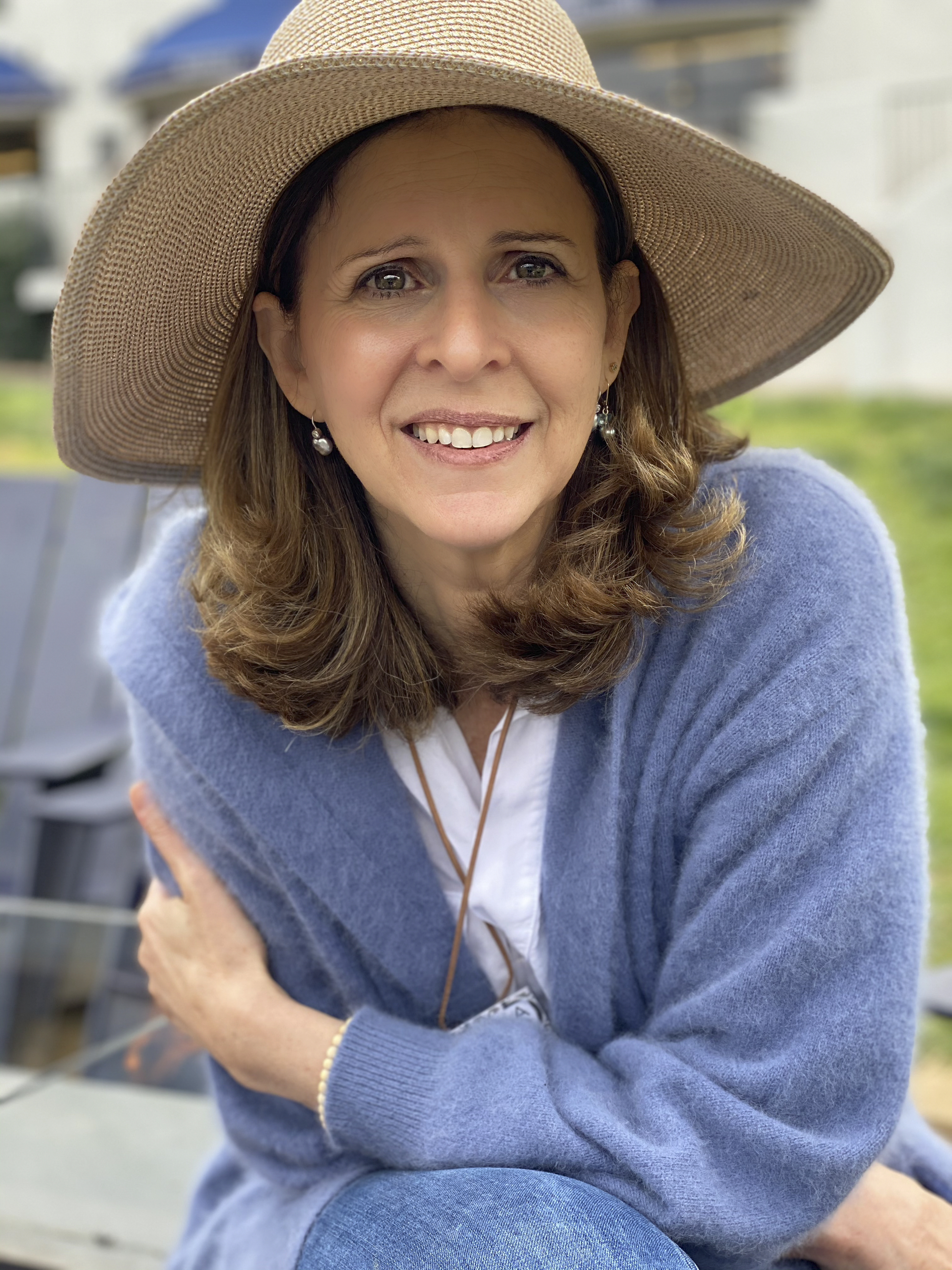 Amy Ziering in 2020.